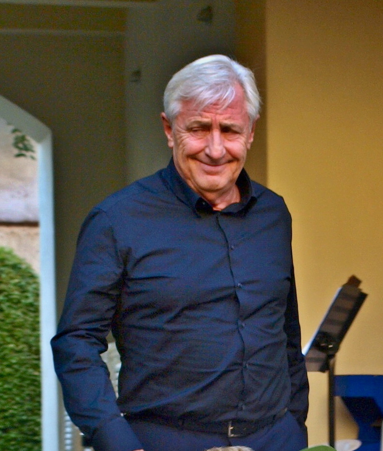 Karel Heřmánek v roce 2015 (Lichtenštejnský palác v Praze)